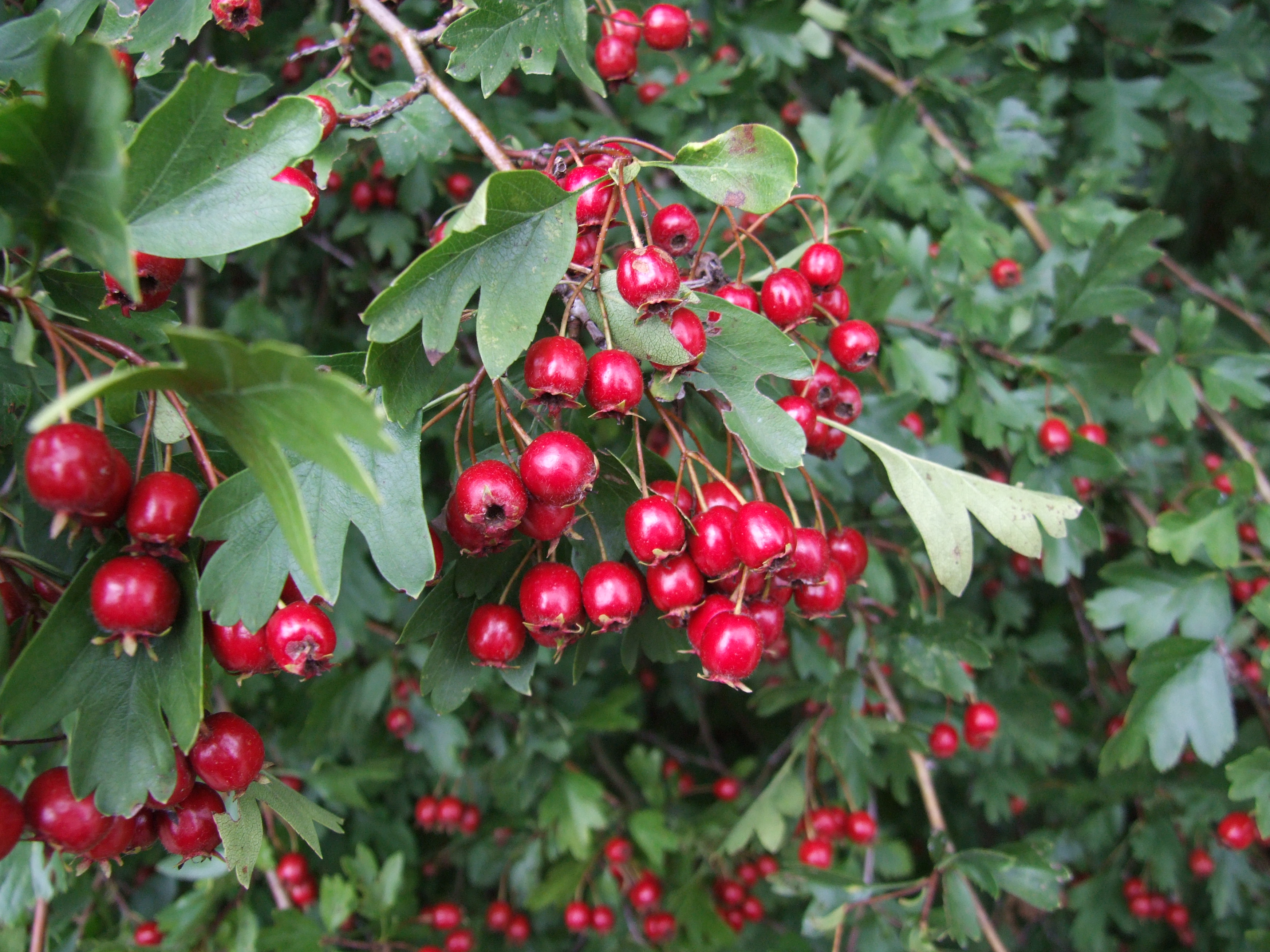 Weißdorn - Früchte aufgenommen im Außengelände des Besucherzentrums De Nachtegaal, De Panne, Belgien, im Bereich der Oosthoekduinen